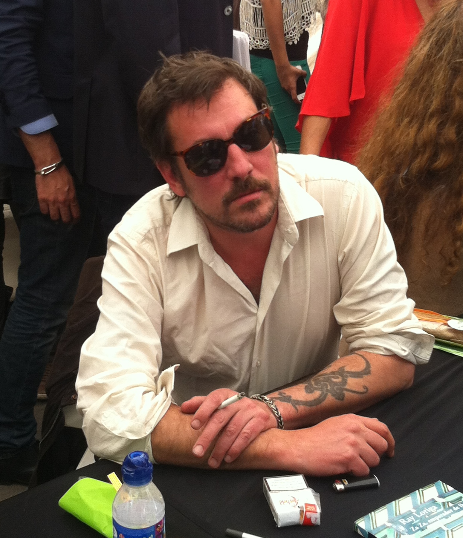 Diada de Sant Jordi 2014